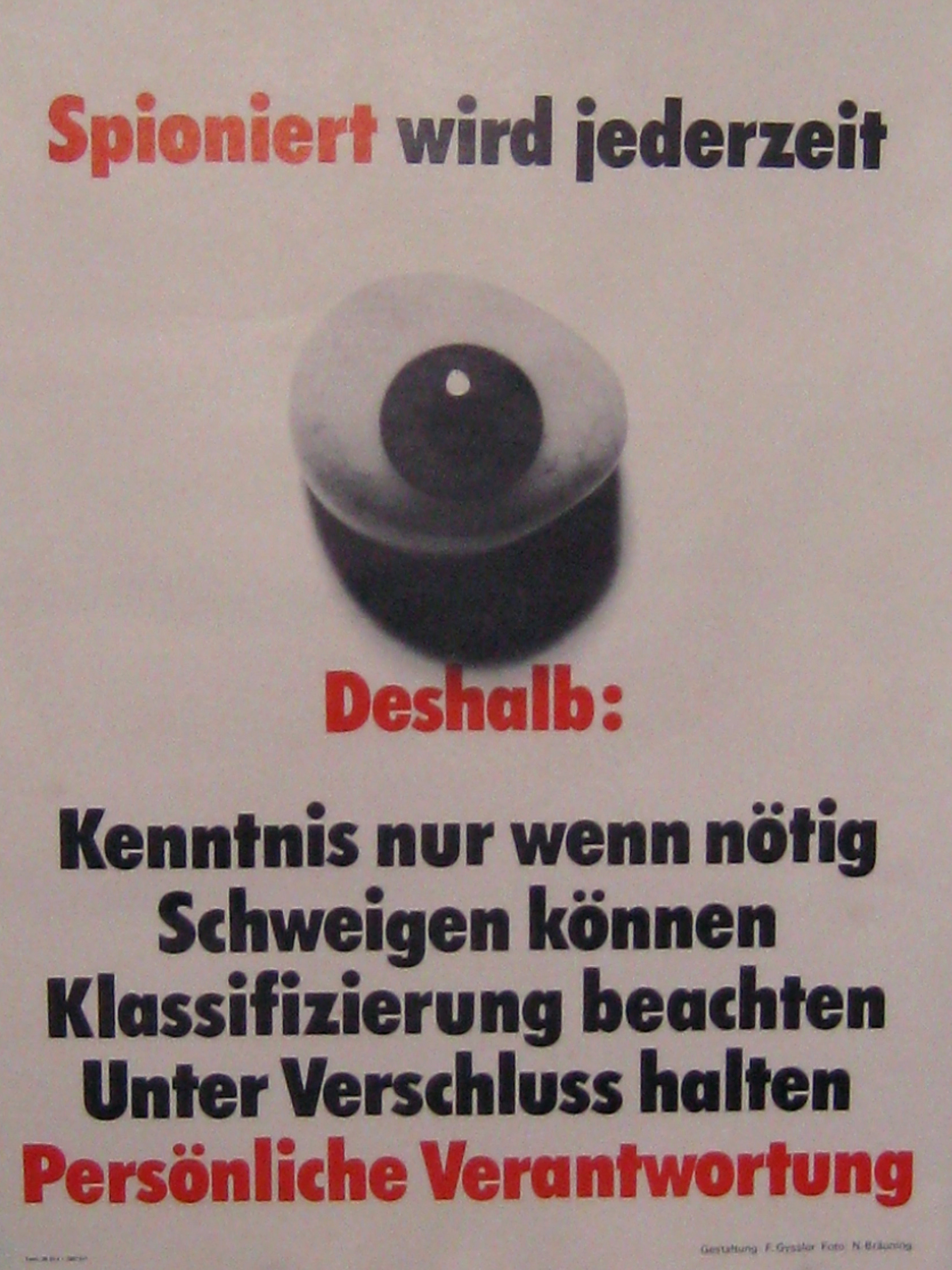 Aufnahme in der Anlage A 4247 Bernau ("Strahler"), Leibstadt